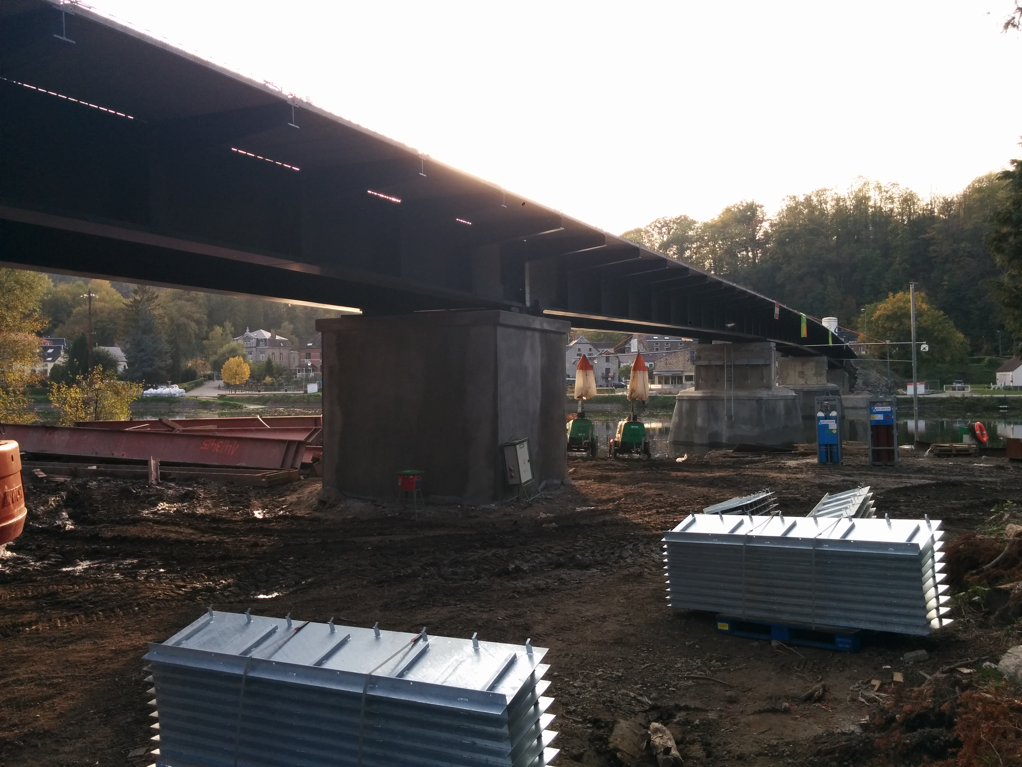 Travaux sur le pont de Godinne, juste après le chômage de la Meuse. On voit sous le tablier, de même que les piles en rivière. This photo of immovable heritage has been taken in the Walloon Region